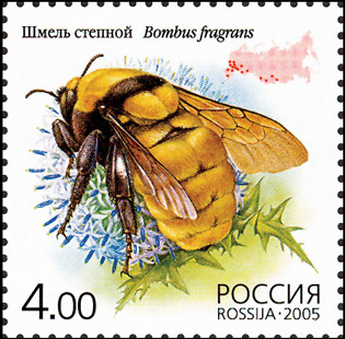 Bombus fragrans